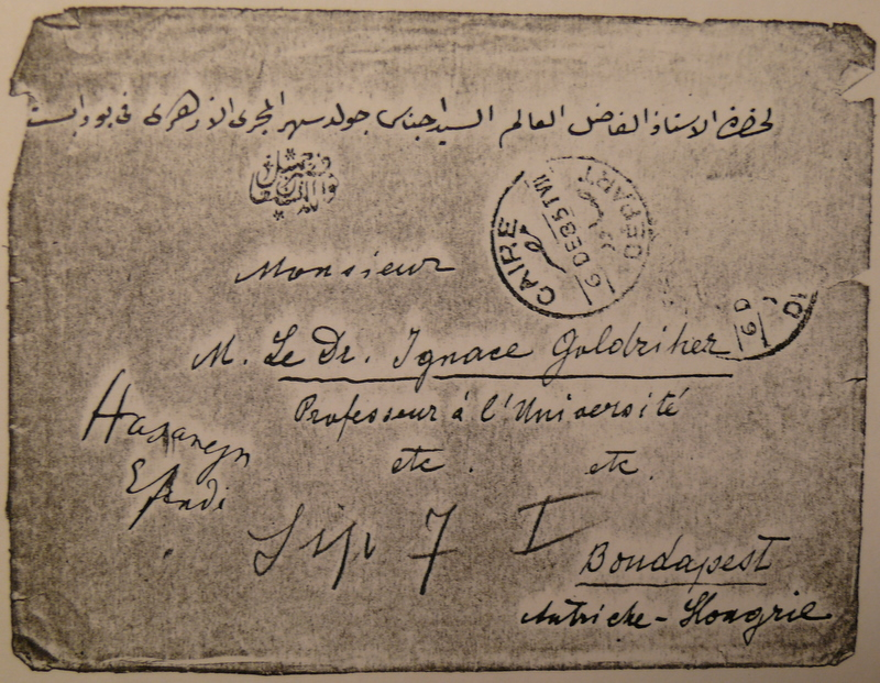 Briefumschlag eines Briefes an Goldziher vo Hasanen Efendi mit Titeln in arabischer Sprache.